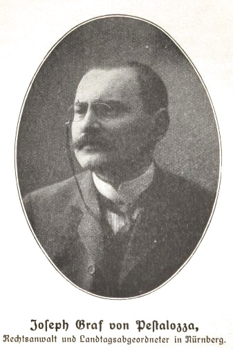 Joseph von Pestalozza (1868-1930), Graf und bayerischer Landtagsabgeordneter, NS-Gegner und katholischer Aktivist